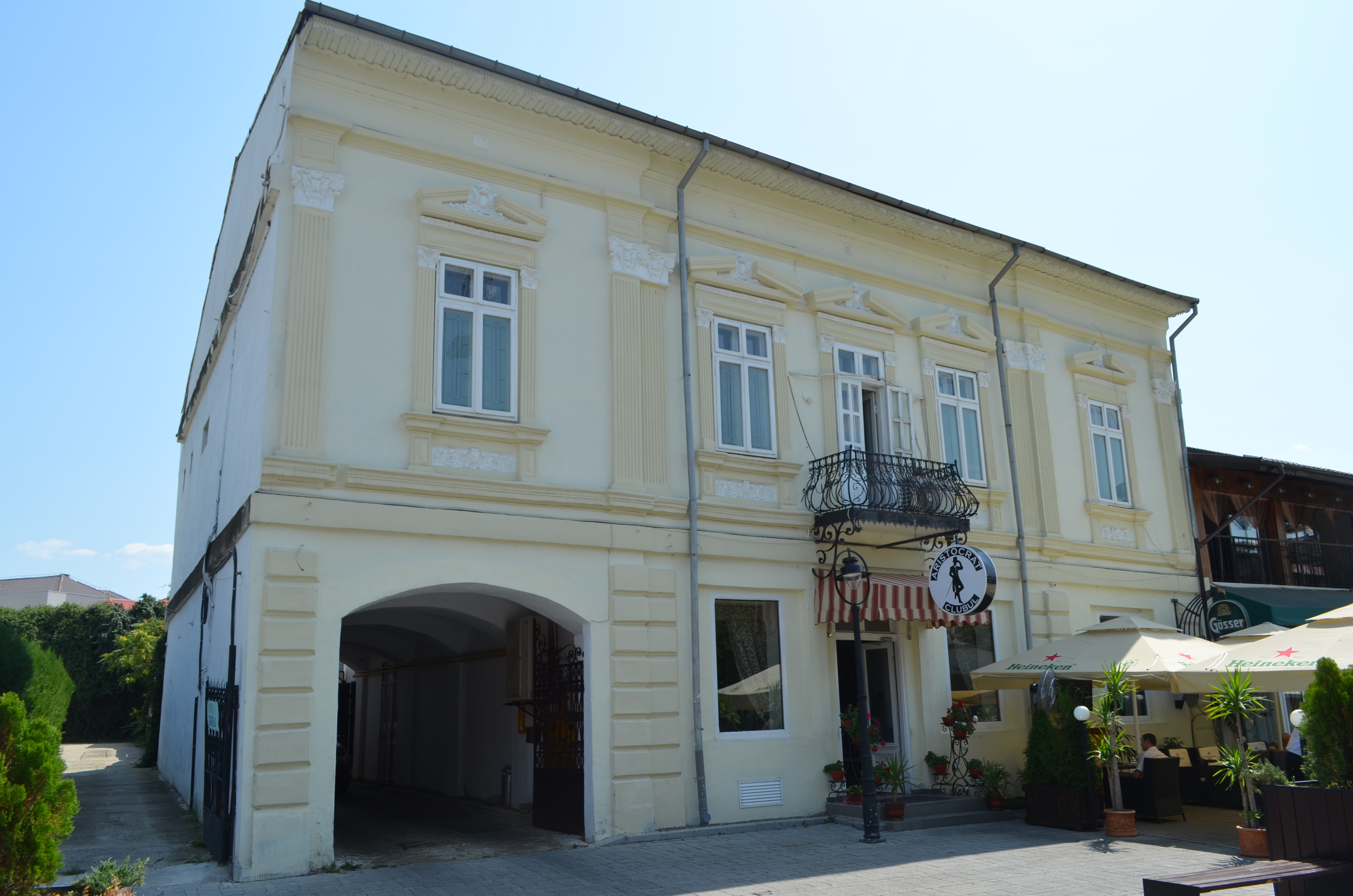 Casa cu parter comercial Greff, azi Clubul Aristocrat, Str. Al. I. Cuza nr. 17, Târgoviște